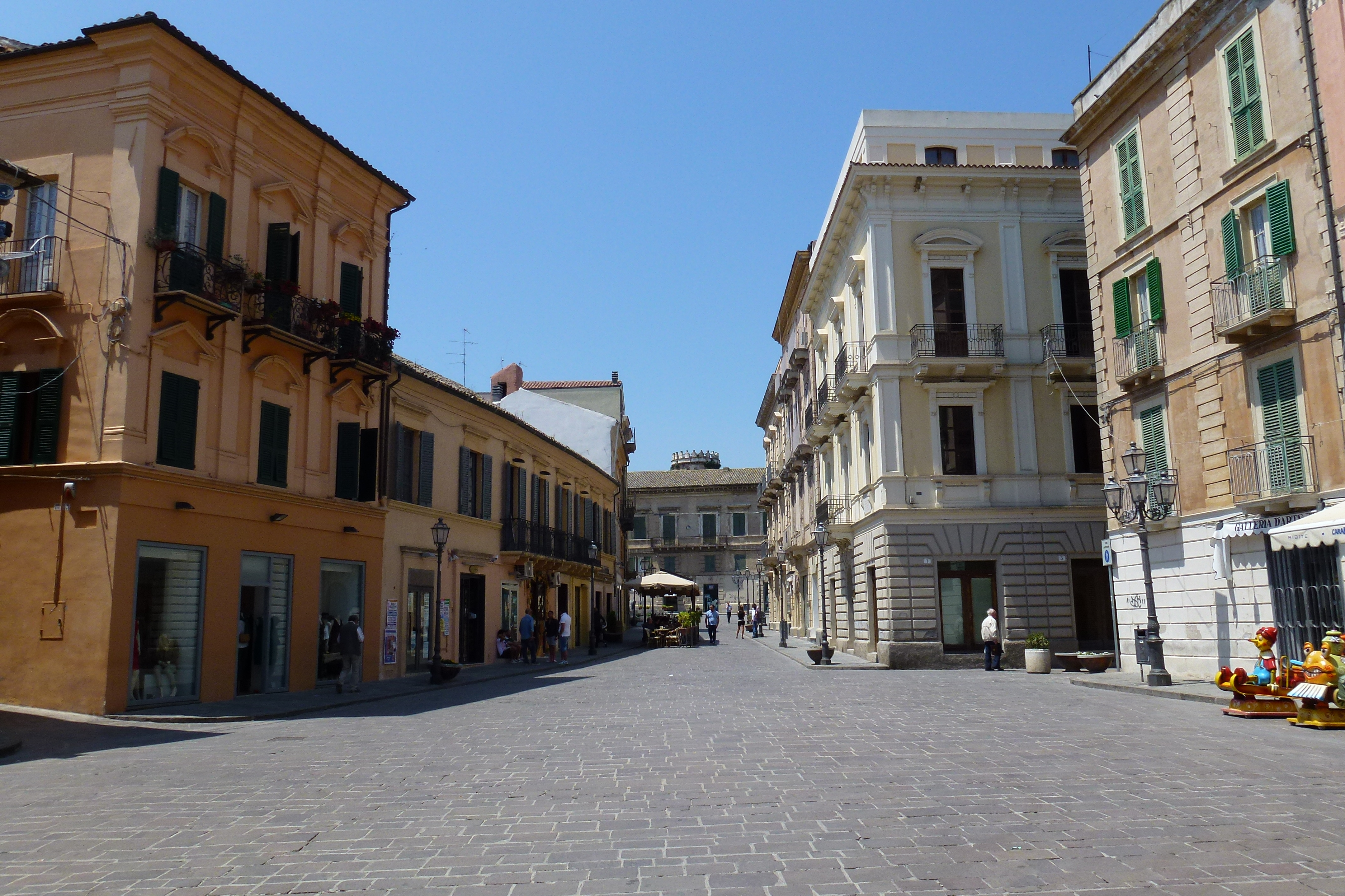 Vasto